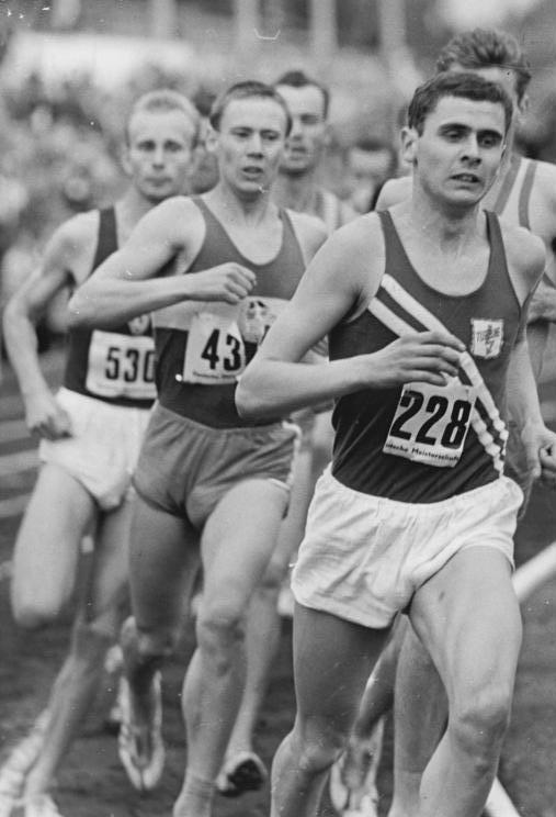 Jürgen May Zentralbild Kohls 31.8.1963 XIV. Deutsche Leichtathletik-Meisterschaften in Jena vom (30.8.-1.9.1963) UBz: Jürgen May (SC Turbine Erfurt) - Nr. 228 rechts-gewinnt den zweiten Vorlauf über 1500 m.